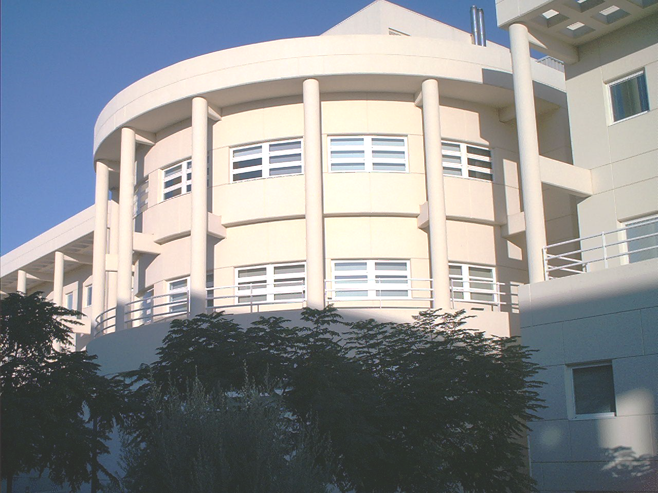 Facultad de Letras de Ciudad Real, sede del Centro de Estudios de Castilla-La Mancha